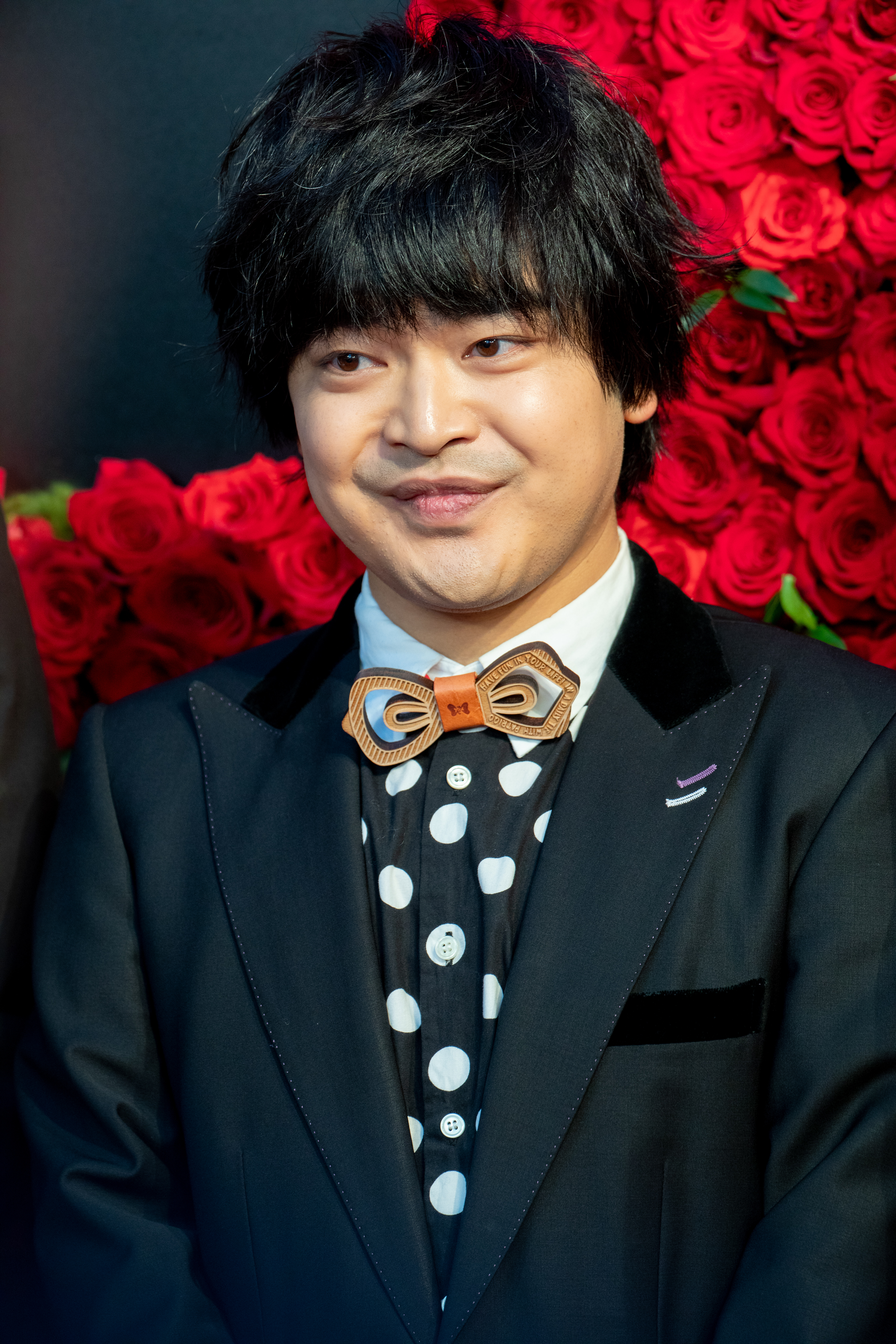 第30回 東京国際映画祭 オープニングセレモニー 加藤諒 (ギャングース)